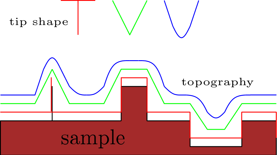 sample topography obtained using different tip of various shapes